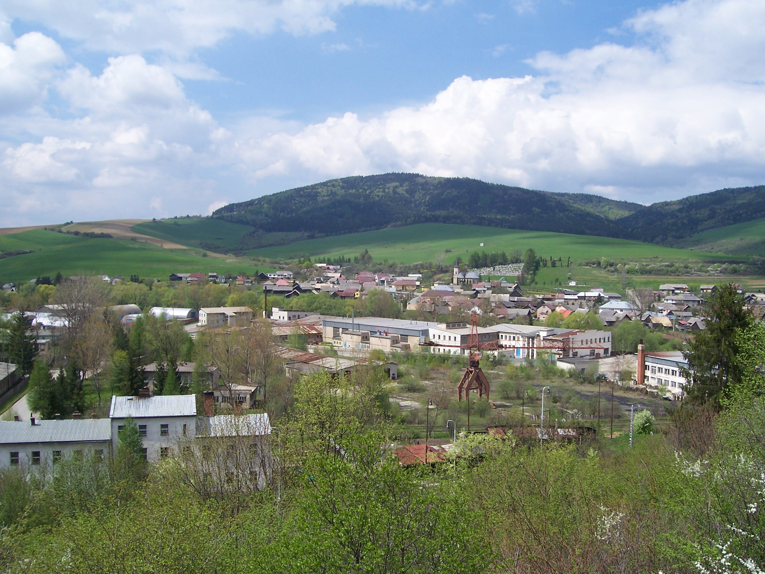 Pohľad na železničnú stanicu a obec